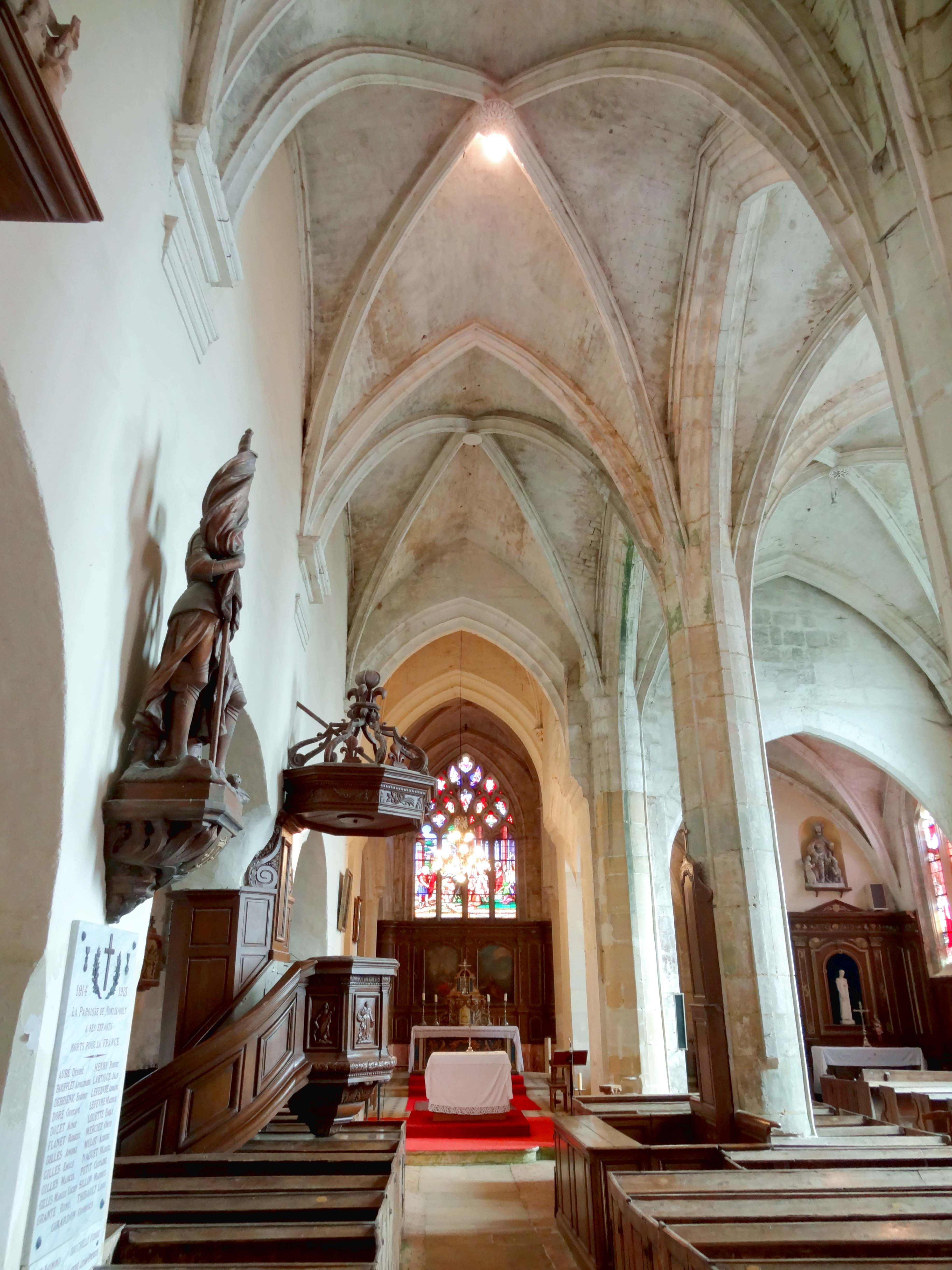 Intérieur de l'église - voir titre.